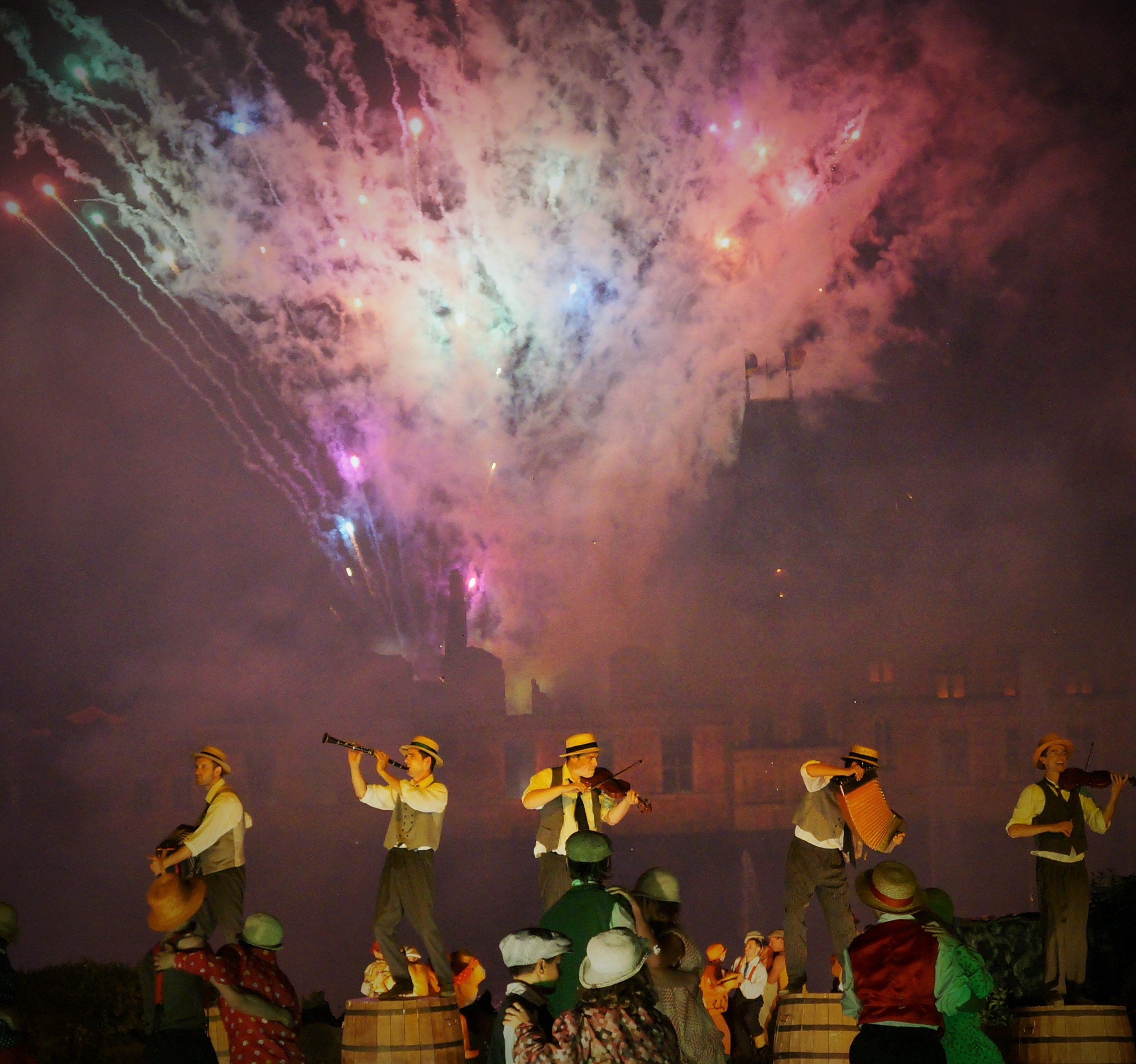 Le Puy du Fou Les Epesses.-.Vendée, France